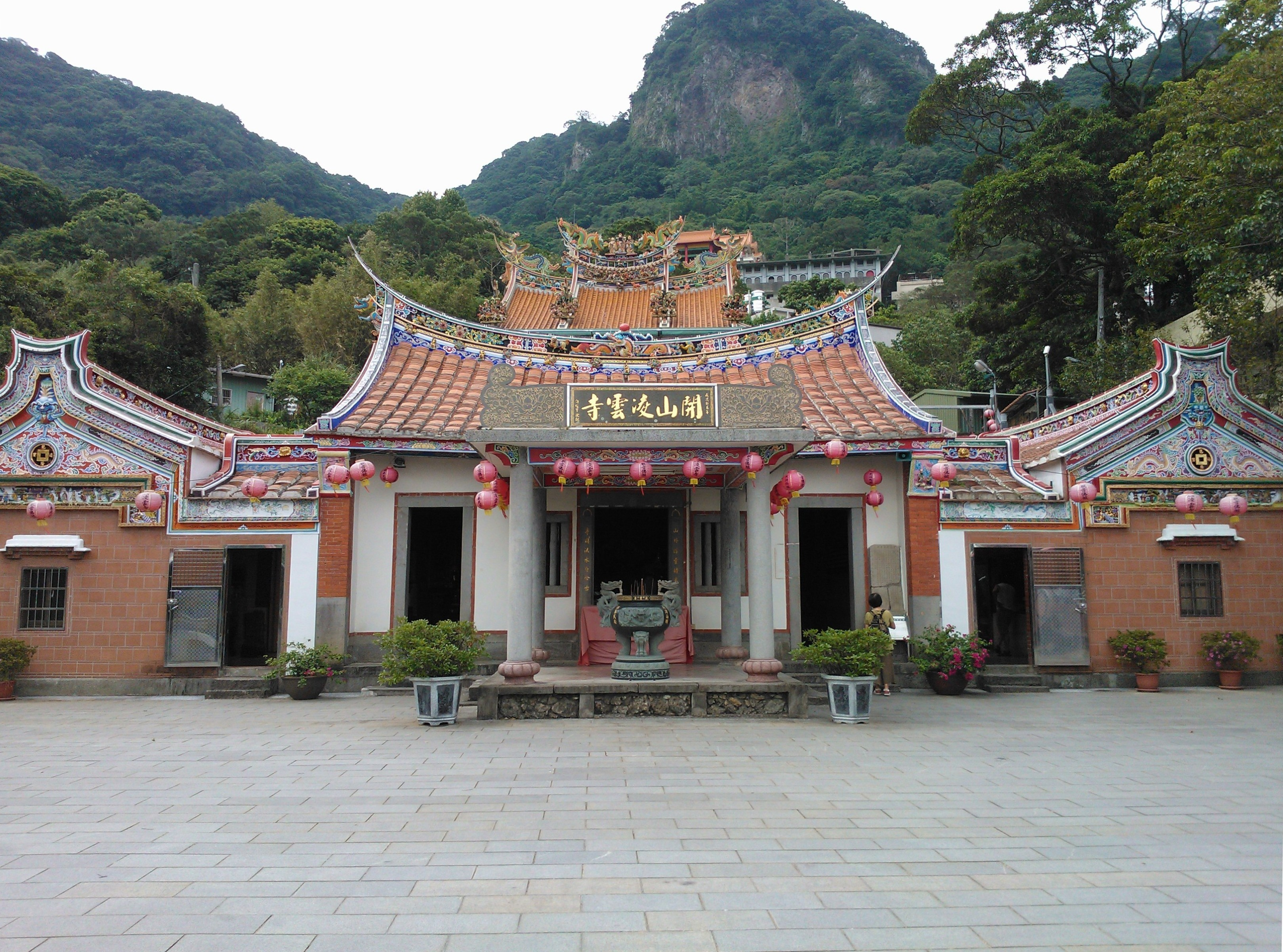 中文（台灣）: 五股凌雲寺（內岩）